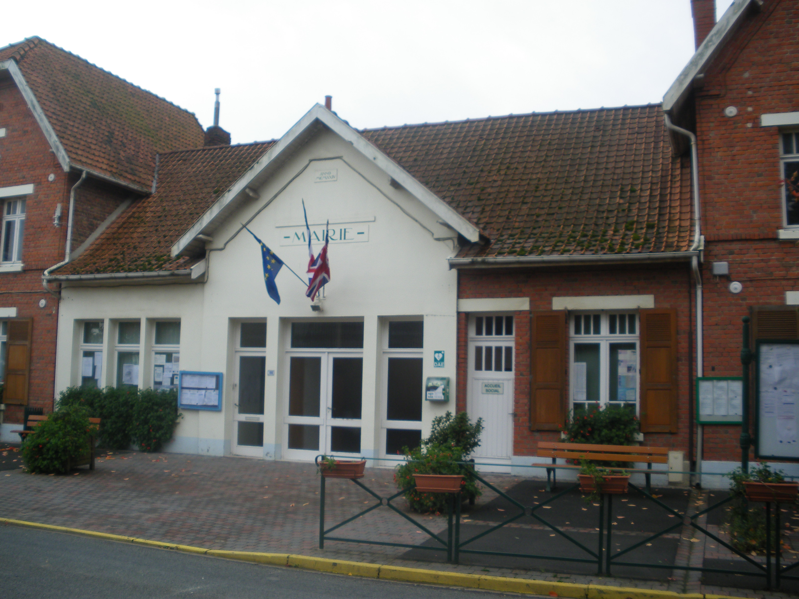 Vue de la mairie de Calonne-sur-la-Lys.